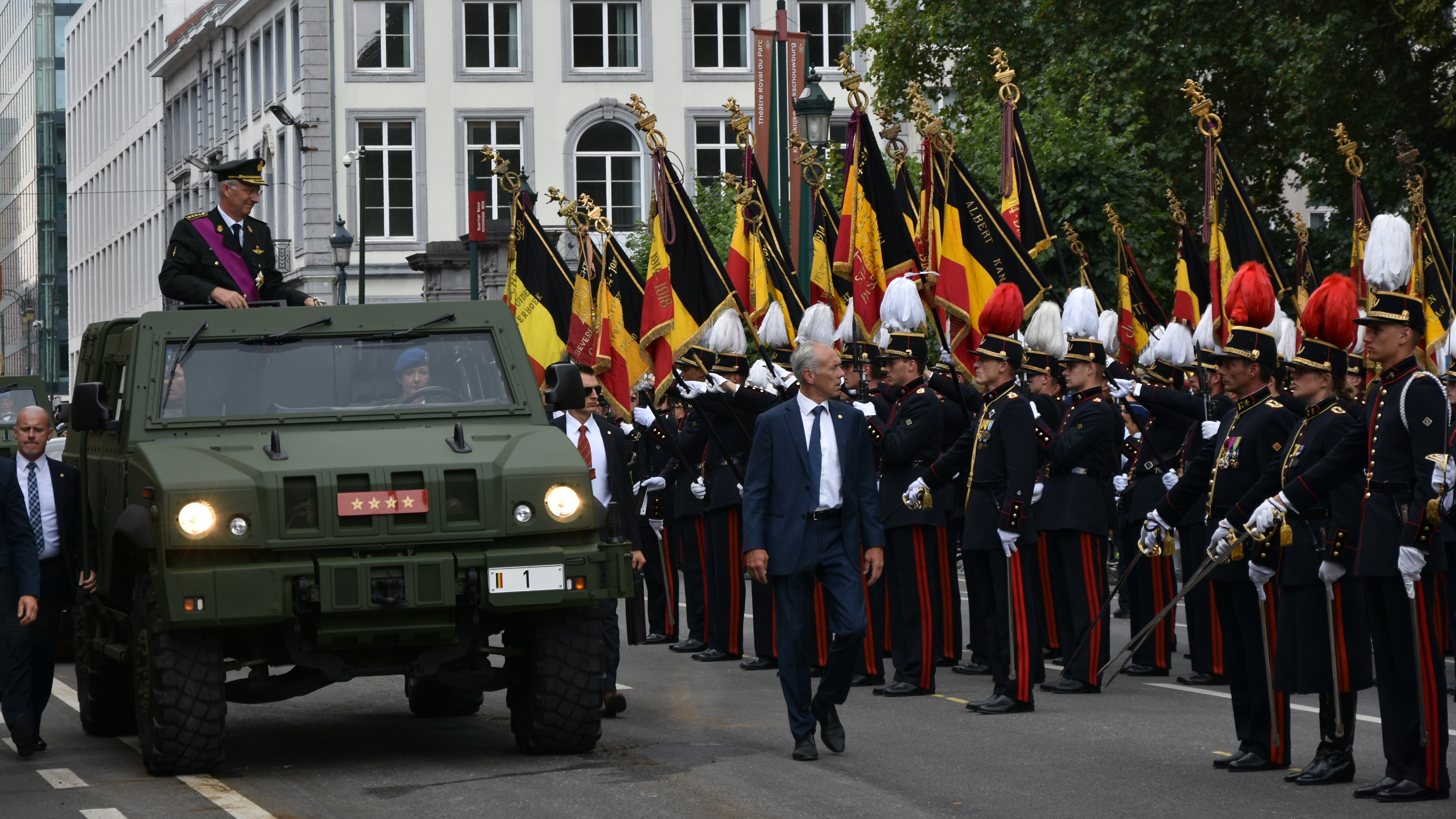 Koning Filip - Nationaal defilé 2018 21-07-2018 15-41-01 This photo of immaterial heritage has been taken in the Brussels Capital Region